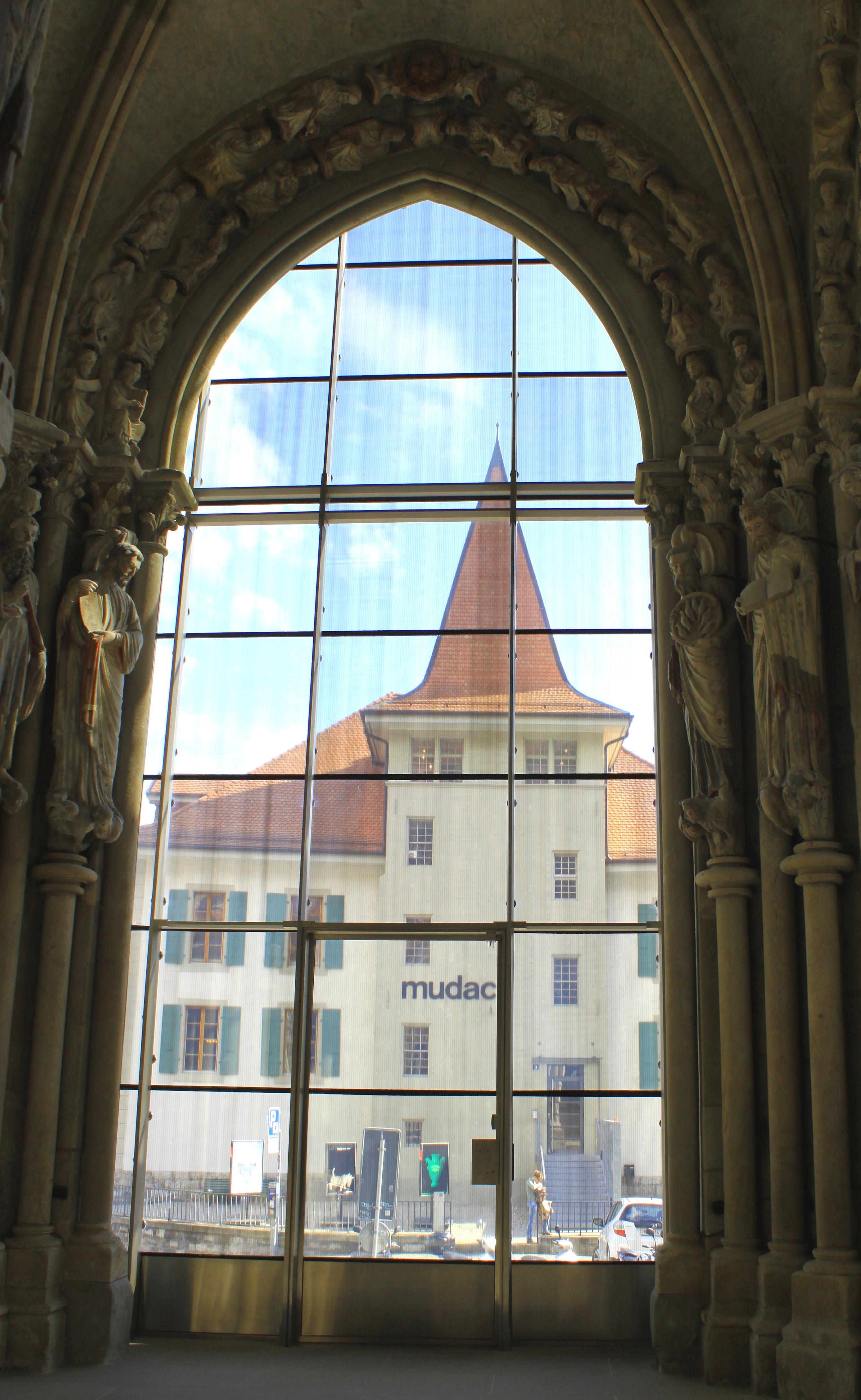 Suisse, canton de Vaud, Lausanne, Musée de design et d'arts appliqués contemporains (MUDAC).